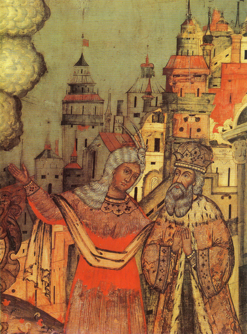 Пророчество сивиллы Тибуртины, 1763. Фрагмент. Из церкви Спаса на Валушках в Каргополе